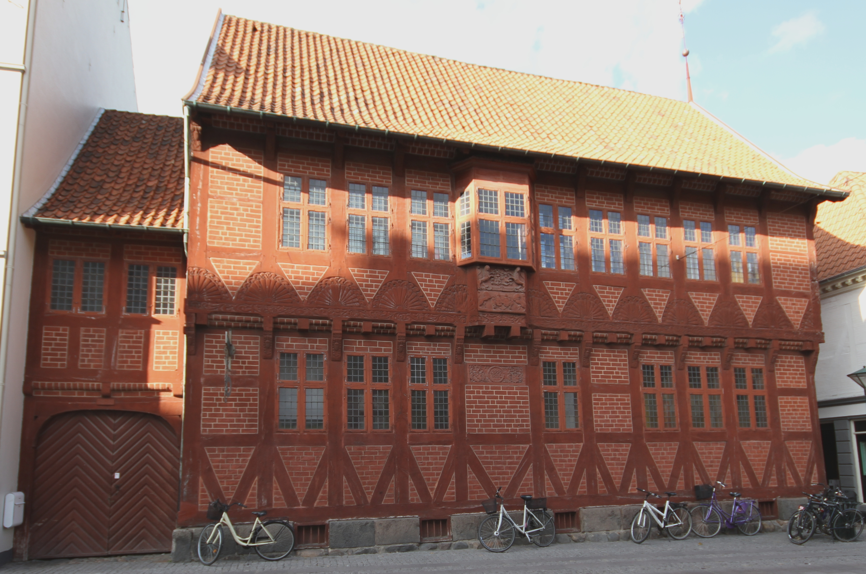 Bymuseet Møntergården i Odense / The city museum Møntergården in Odense, Funen, Denmark